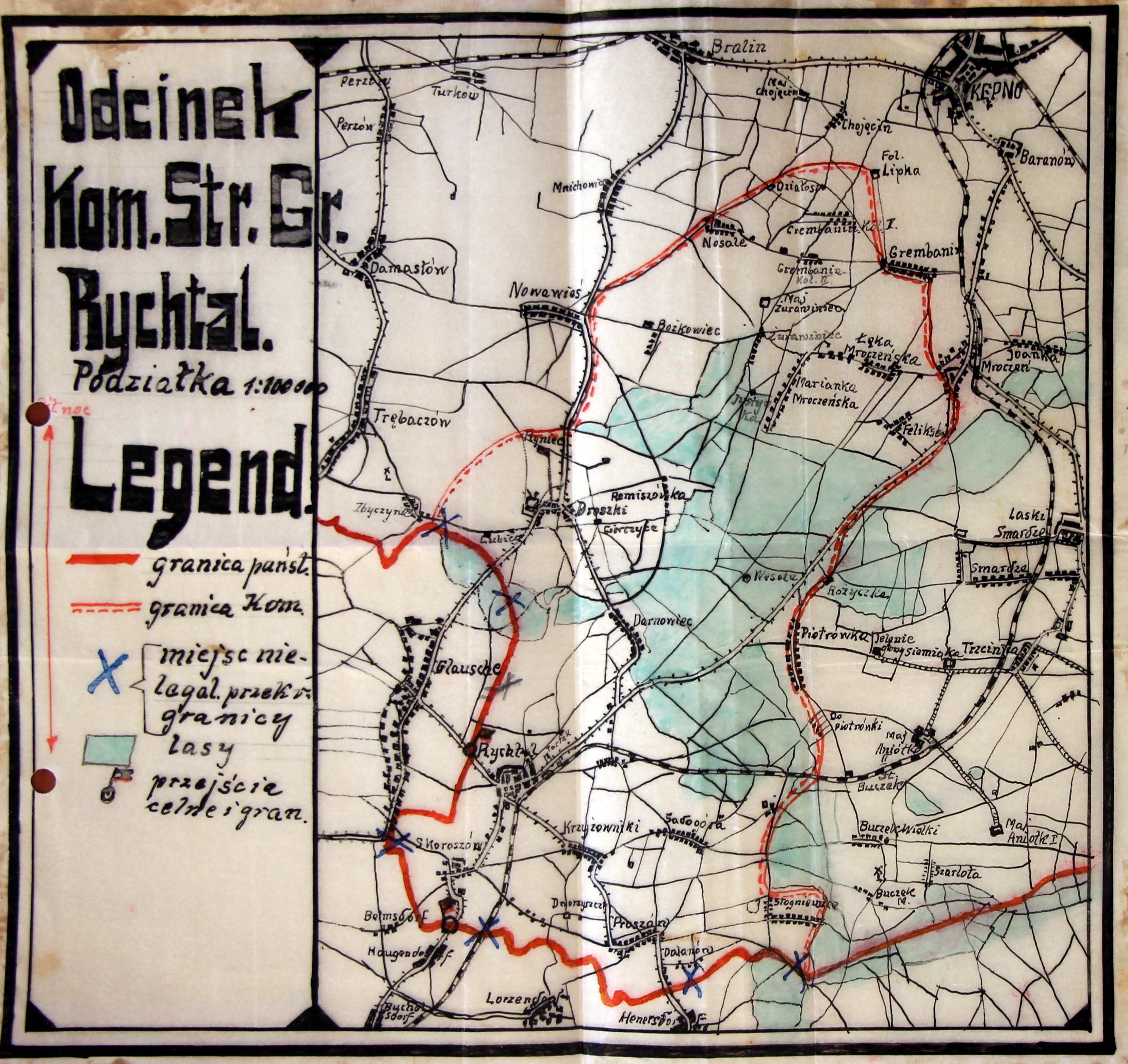 Szkic komisariatu SG Rychtal - lata 30. XX wieku